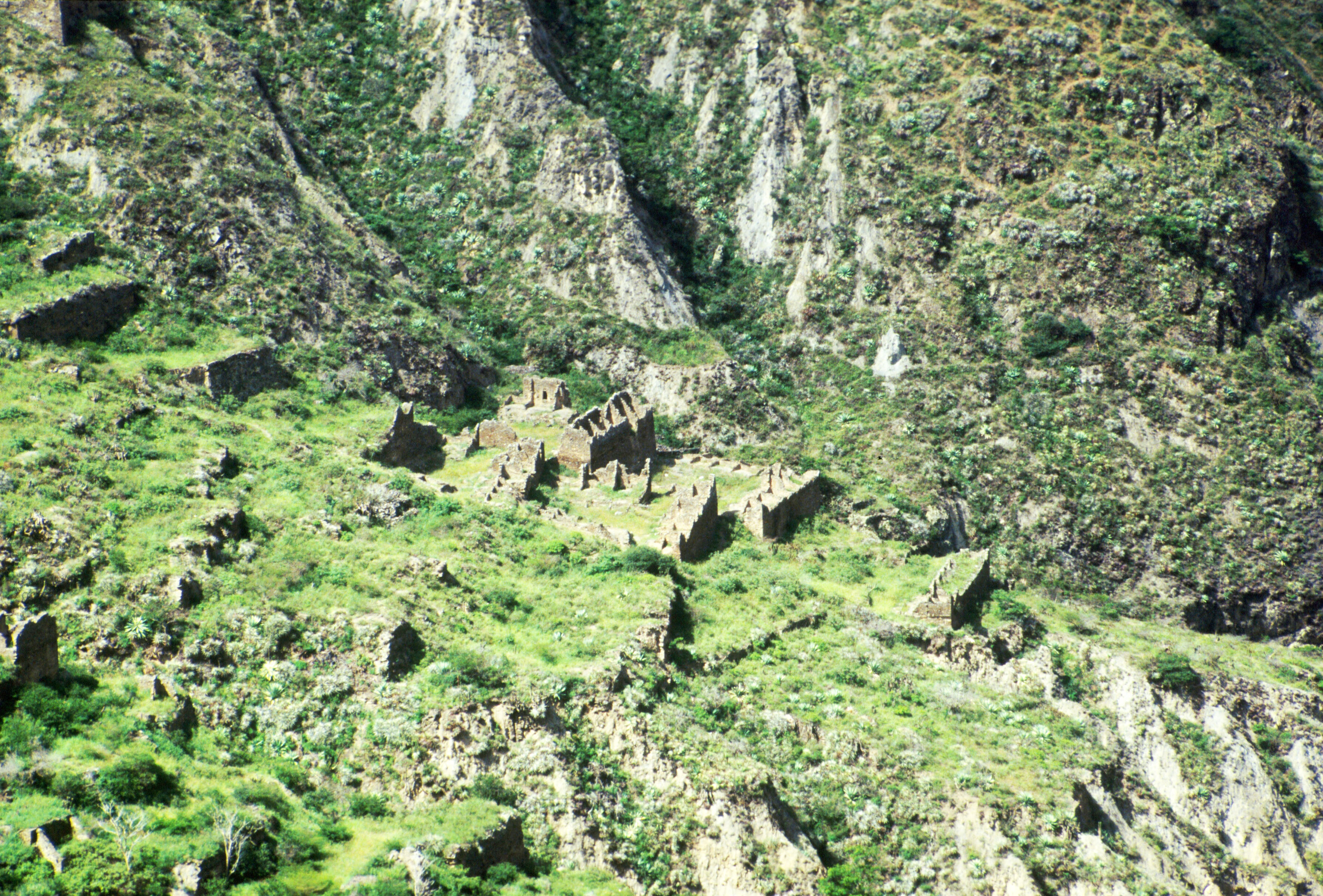 Ruinas Arqueológicas de la ciudadela de Iskanwaya This medium shows the protected monument with the number L/00-305 in Bolivia.